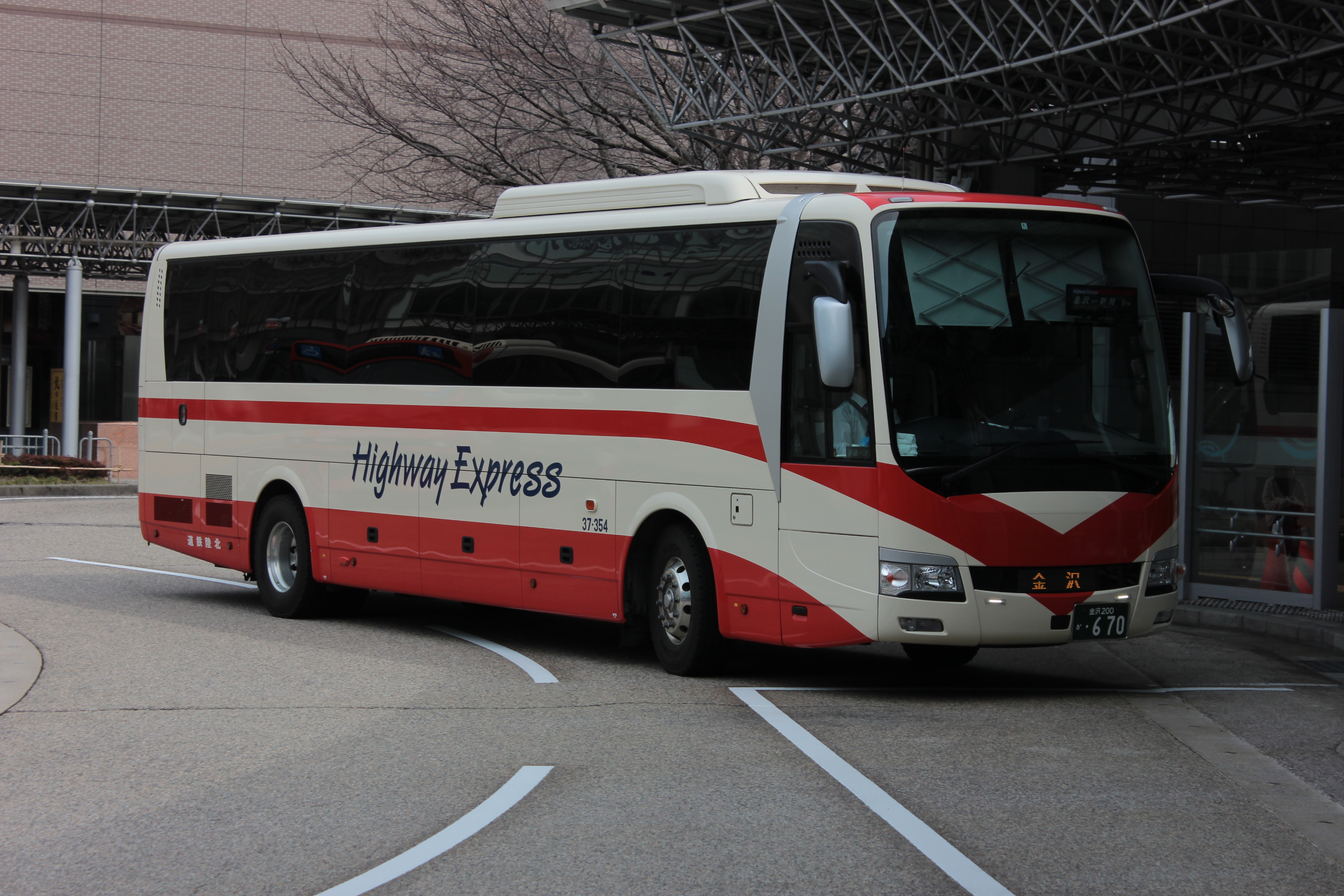 北陸鉄道の高速バス（三菱ふそう・エアロエース）、金沢 - 新潟線で使用される現行車両。通称「赤帯車」。金沢駅東口にて。 Canon EOS Kiss X5